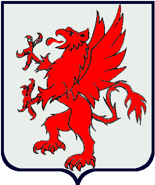 blason.griffon.créé perso. GFDL Utilisateur:Ssire